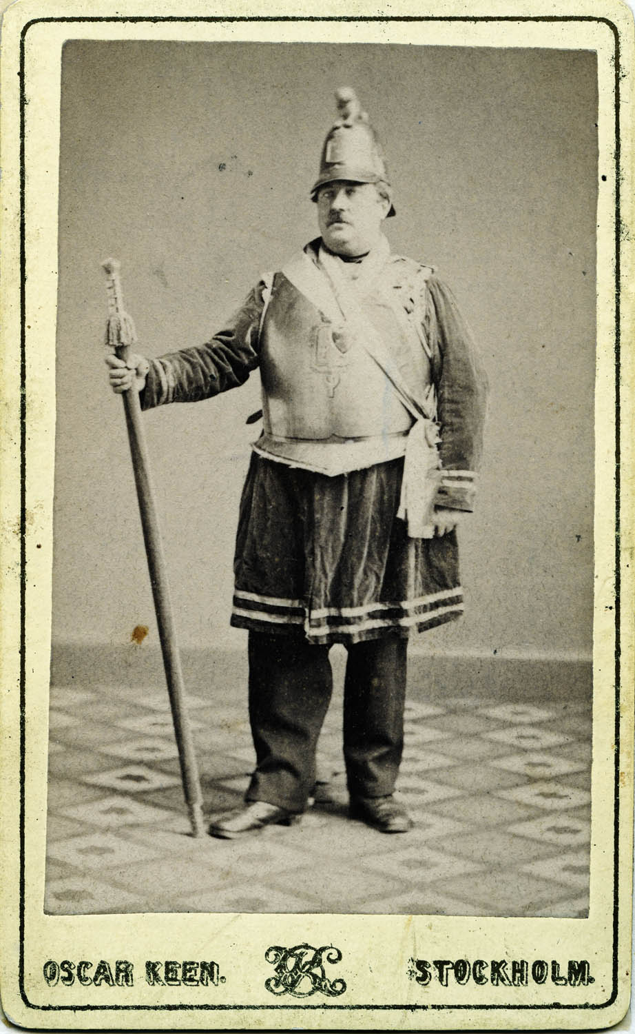 Décors maçonniques des grades chapitraux du rite suédois vers 1870-1890